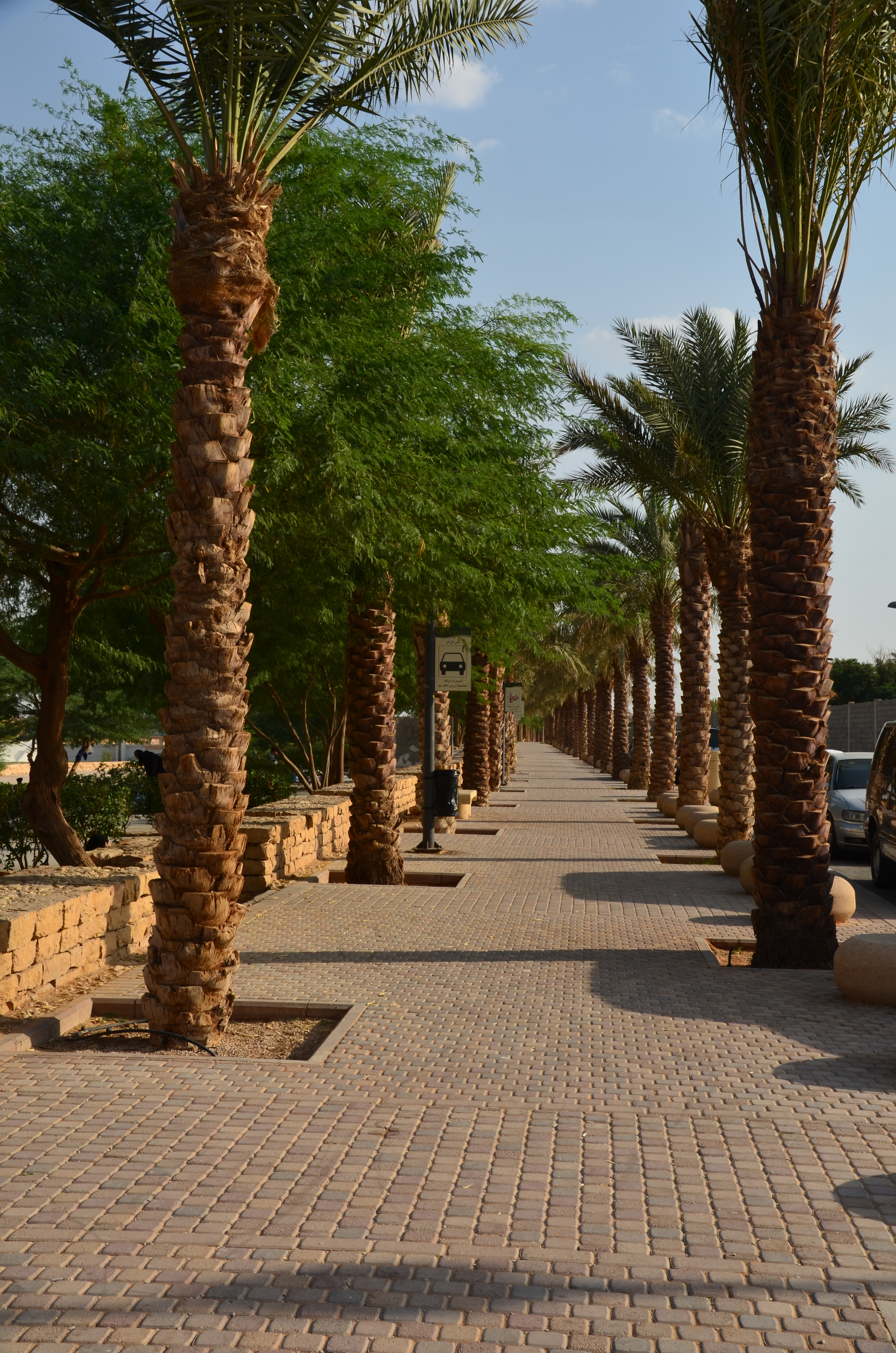 سد الدرعية بالعلب الممشى قرب السد المملكة العربية السعودية 2012